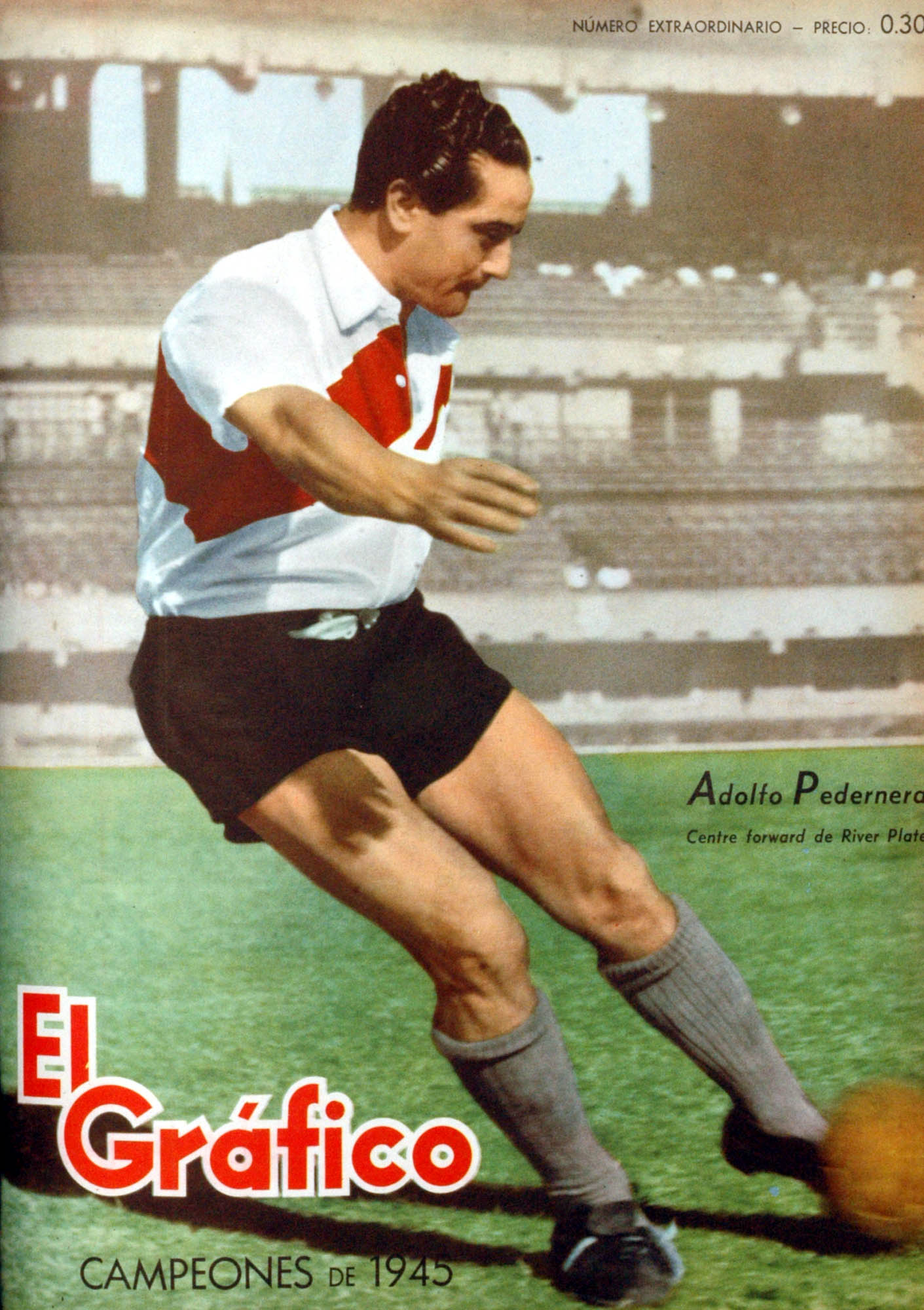 El Grafico del 04 de Enero de 1946. Edicion 1382